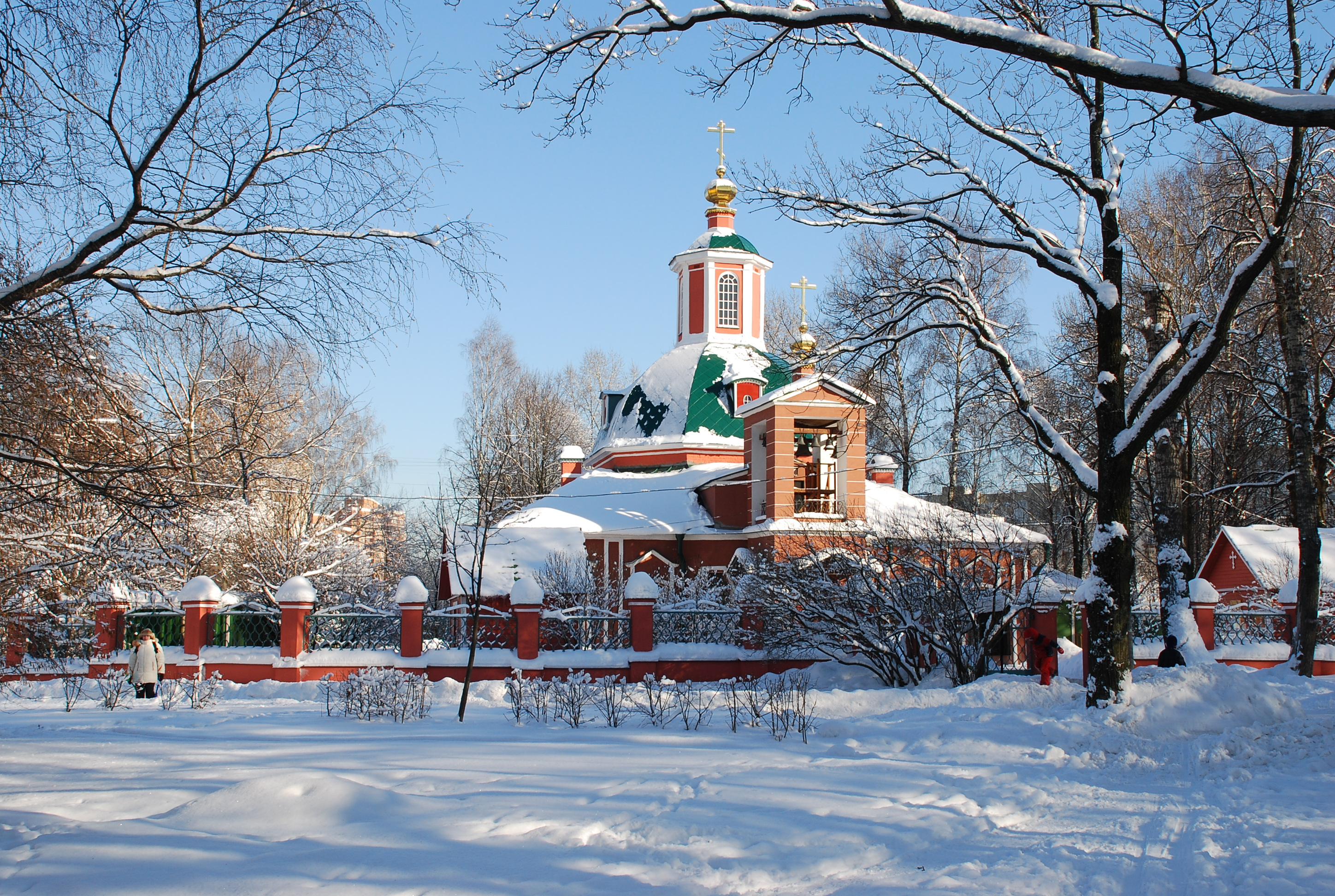 Церковь Троицы в Воронцовофотография памятника архитектуры